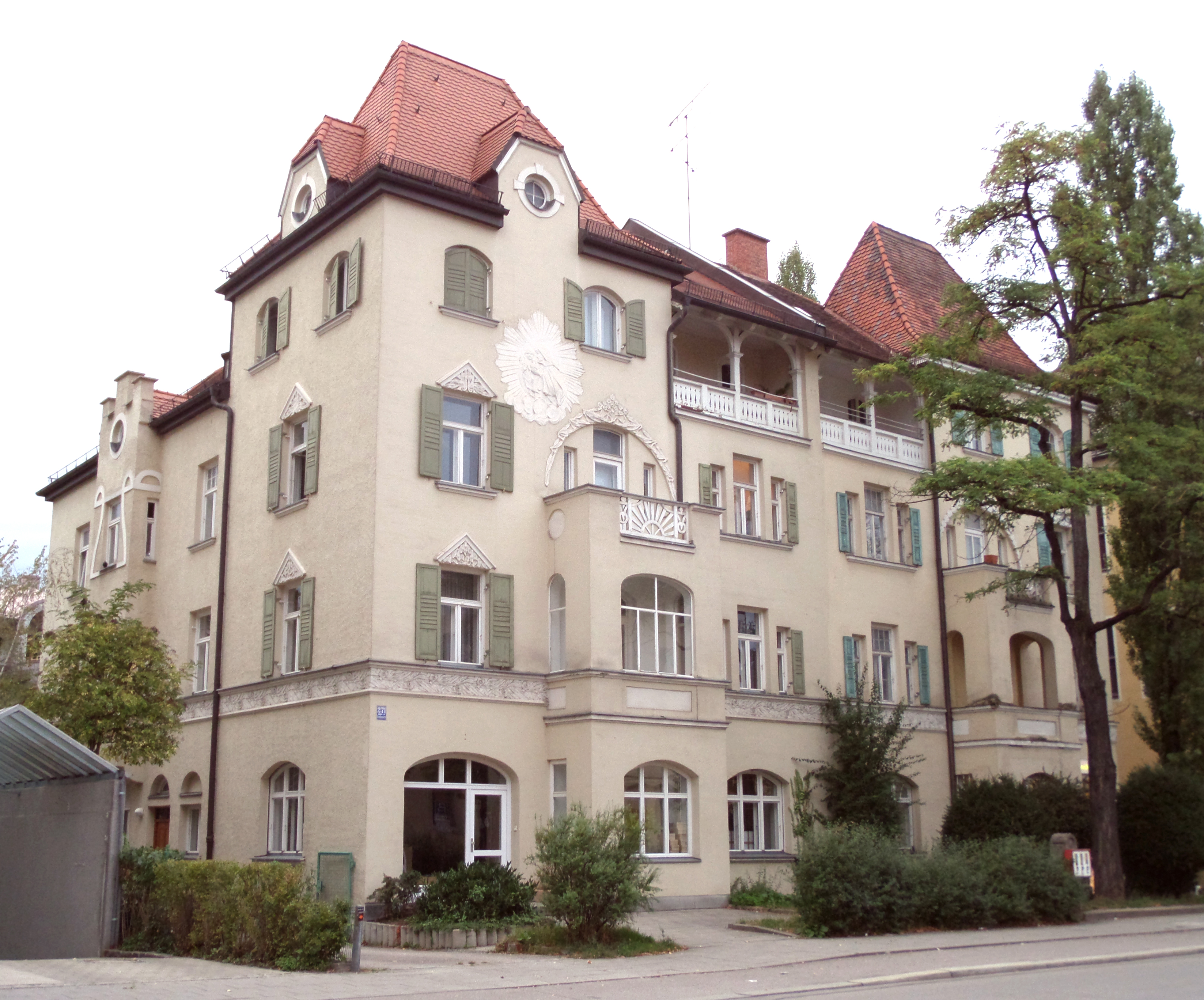 Häuserblock Schleißheimerstr. 271-273, Milbertshofen, München, Jugendstil, mit Bodenerker und Stuckdekor, Anfang 20. Jh.; Madonnenrelief.This is a photograph of an architectural monument.